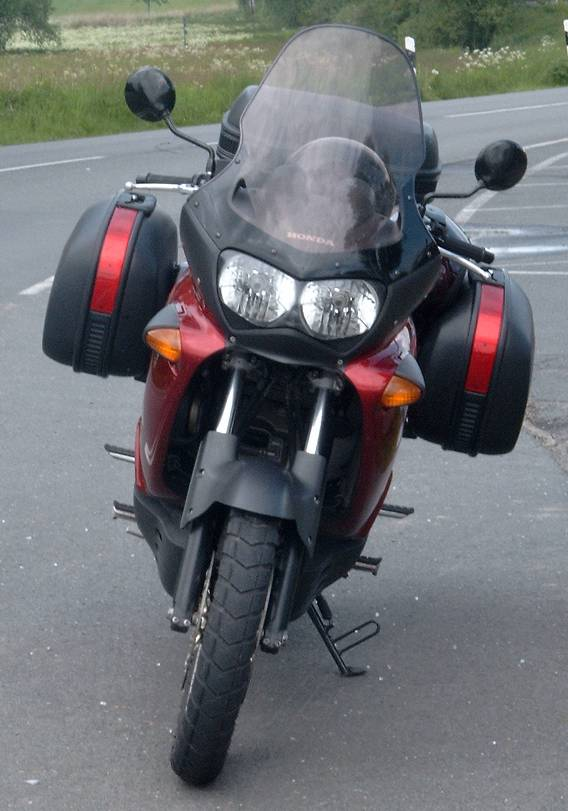 Honda Vardero XL1000 V Bj.2000